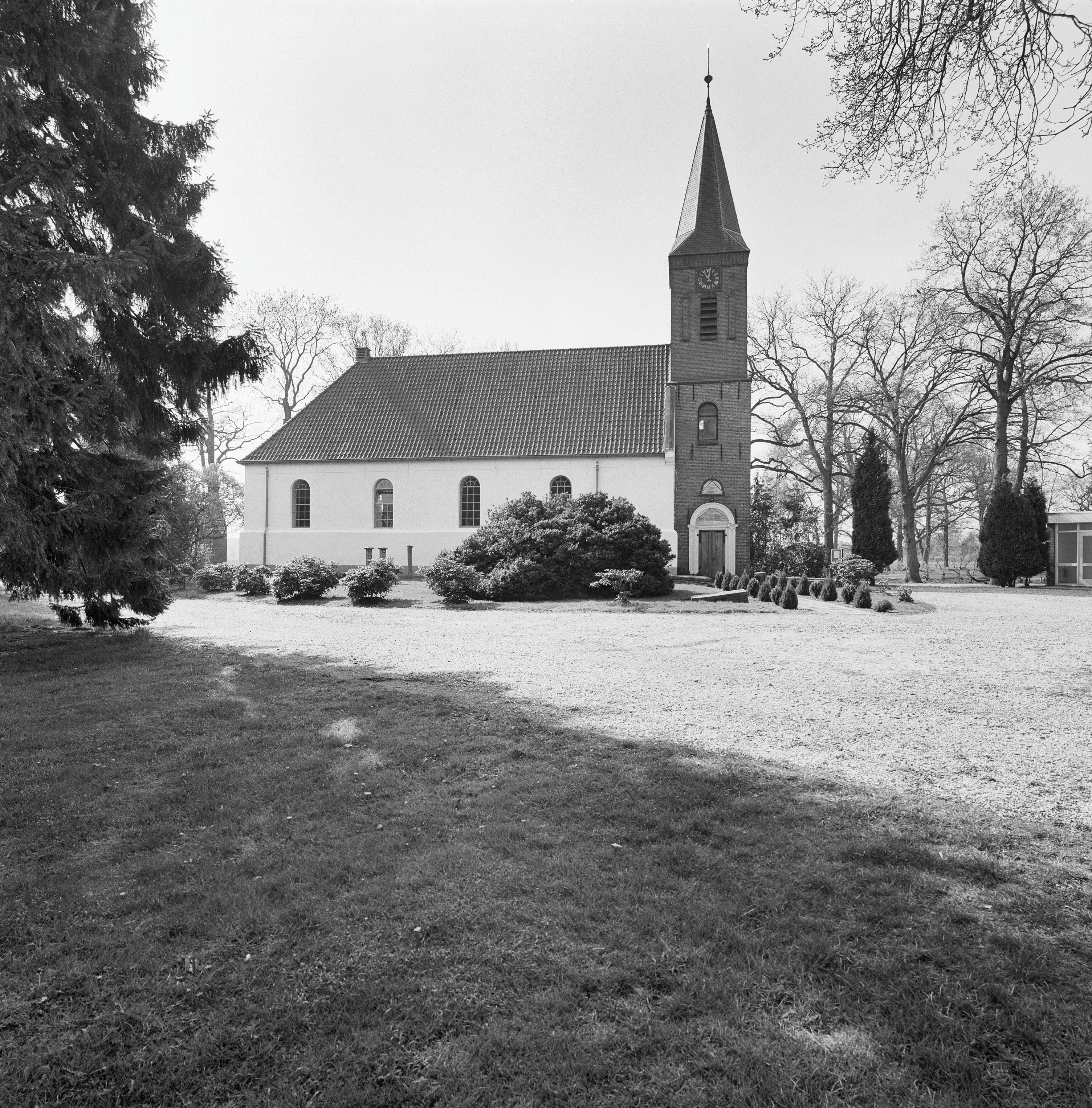 Nederlands Hervormde Kerk: Overzicht noordgevel met kerktoren (opmerking: Gefotografeerd voor Monumenten In Nederland Groningen)